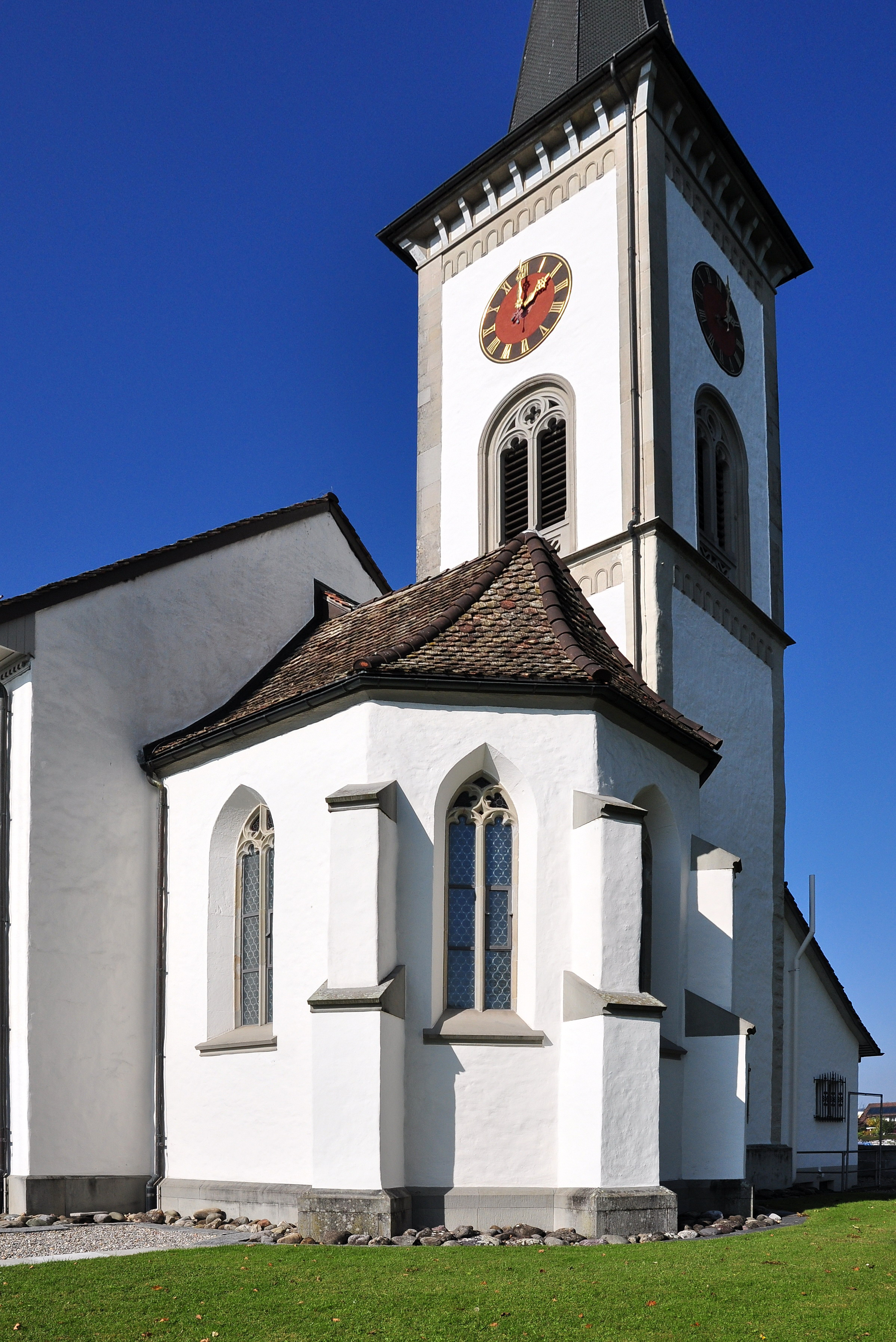 Busskirch in Jona (Switzerland) on Obersee (upper Lake Zürich) shore